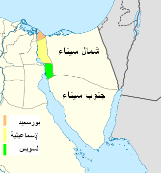 التقسيم الاداري لجزيرة سيناء